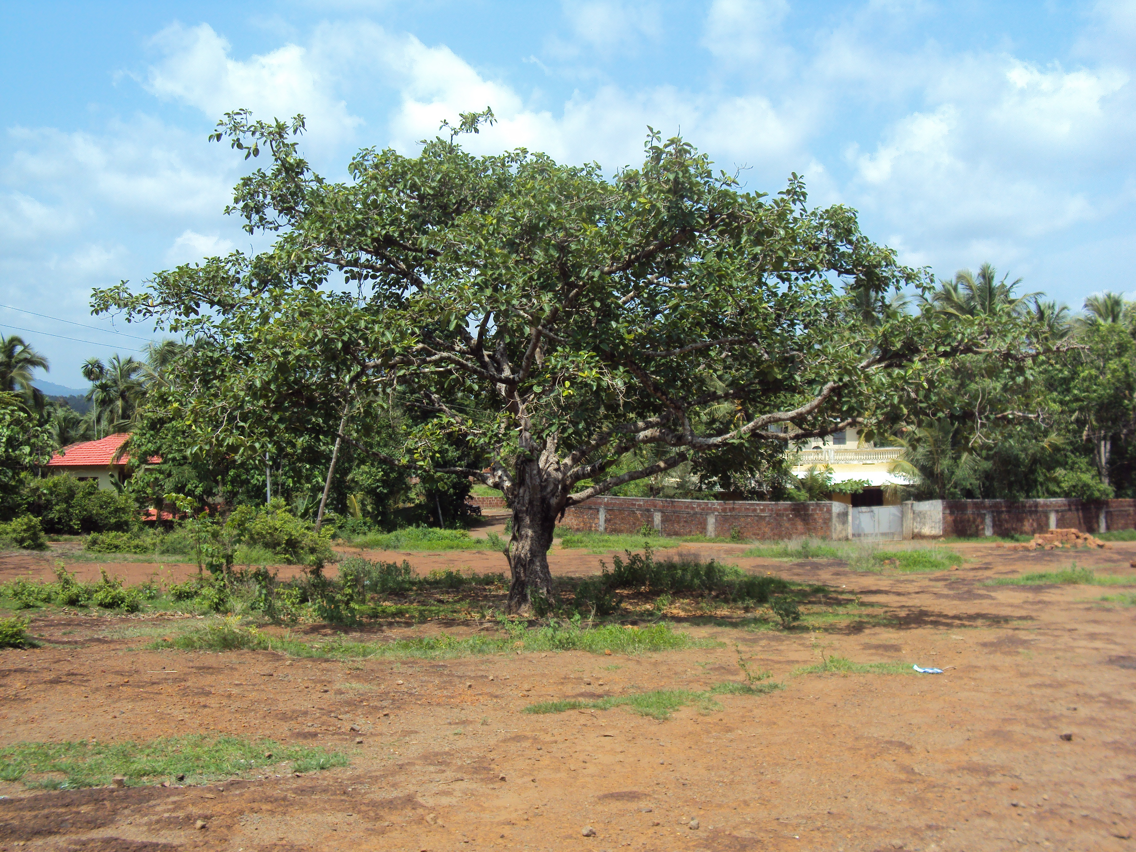 ആൽ മരം